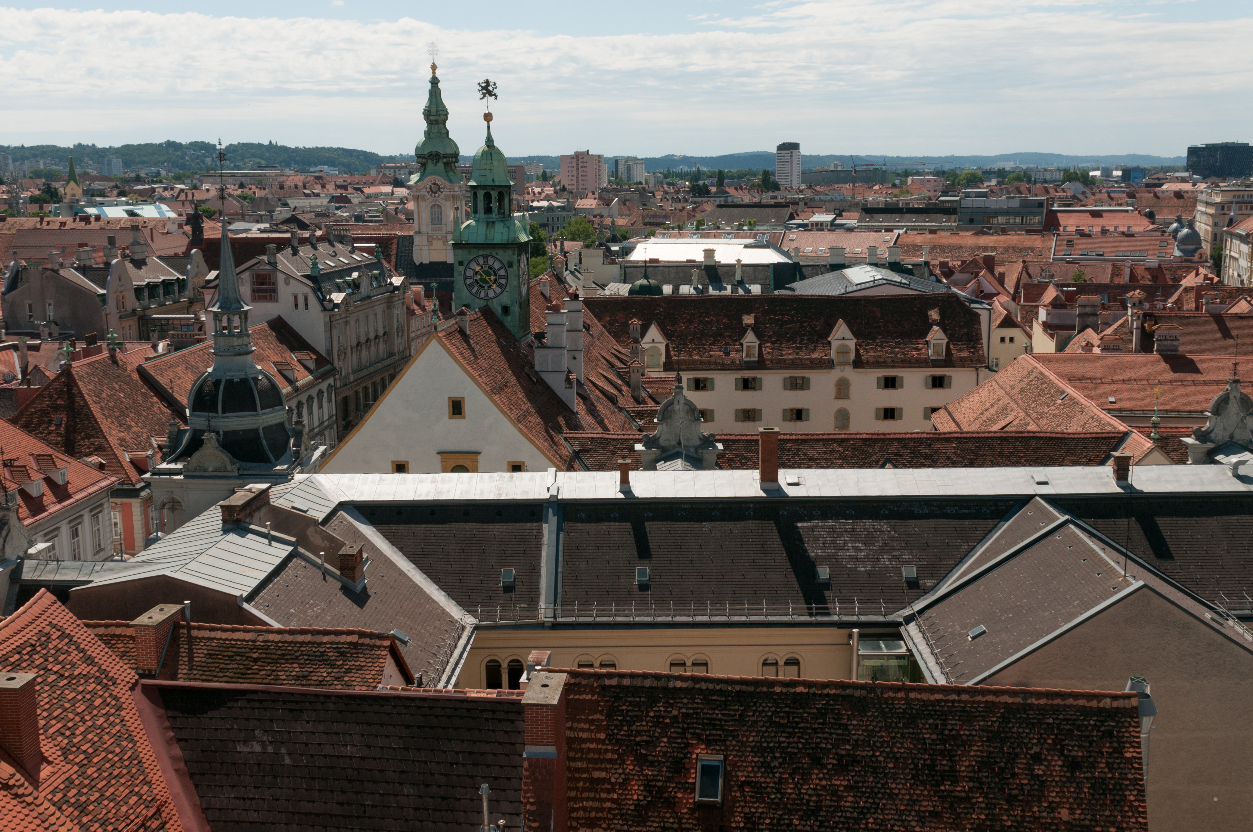 Rathaus Graz, Blick von der Turmspitze